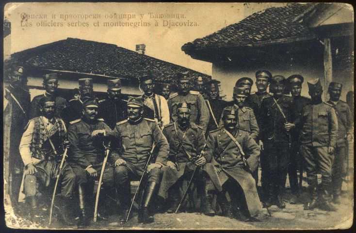 Srpski i crnogorski oficiri u Djakovici 1913. godine.